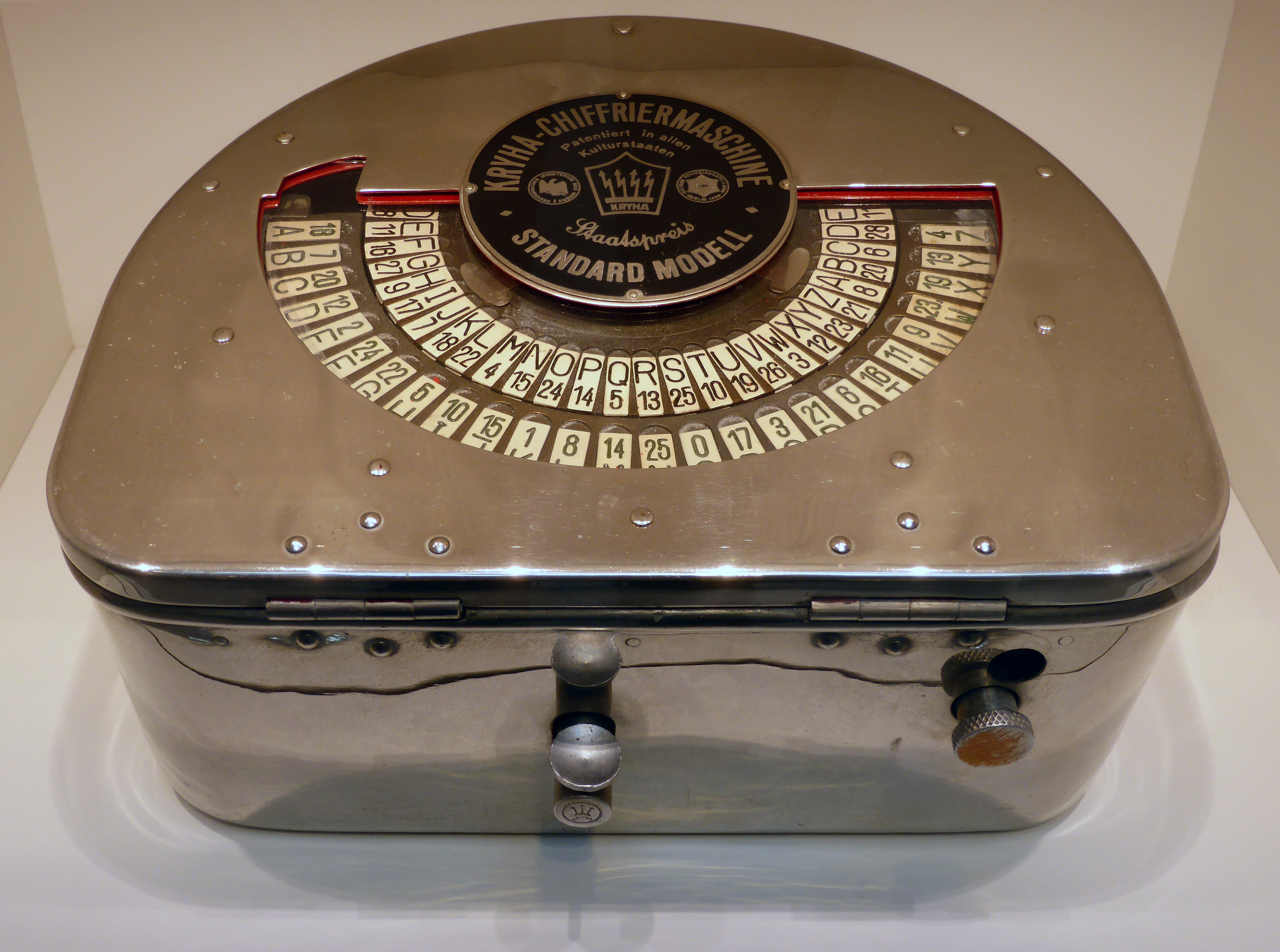 Kryha Chiffriermaschine von 1920er Jahre im Deutschen Technikmuseum in Berlin. Wikipedianische KulTour am 10. Oktober 2015 in der Ausstellung des Museums.